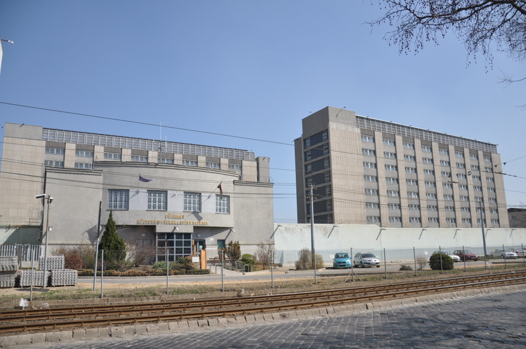 Fővárosi Büntetés-végrehajtási Intézet - Prison Complex in Budapest District X